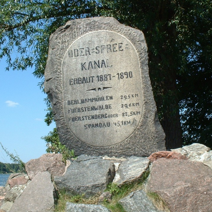 Denkmal am Oder-Spree-Kanal Ausfahrt Seddinsee